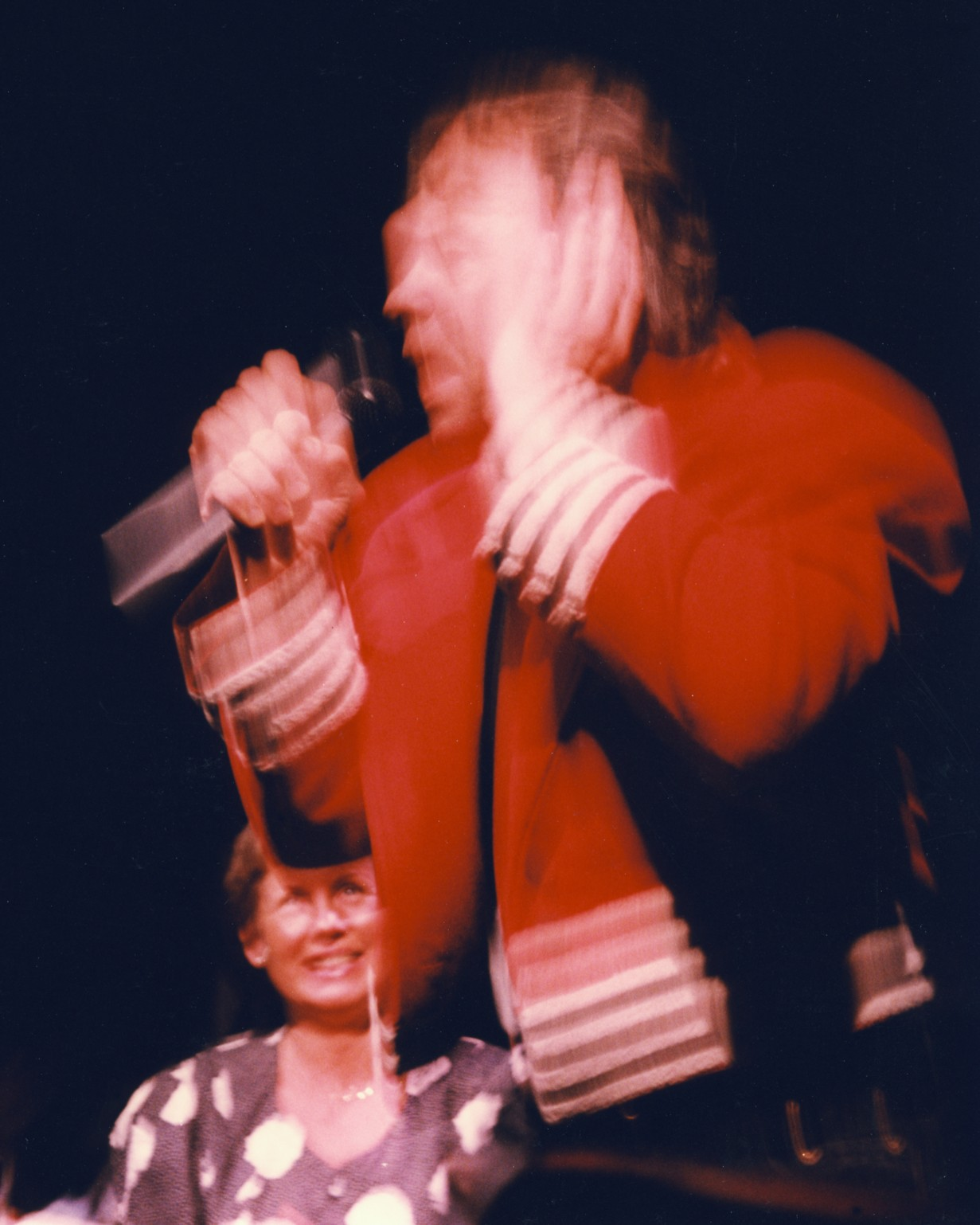 Jerry Williams på Hamburger Börs 1990